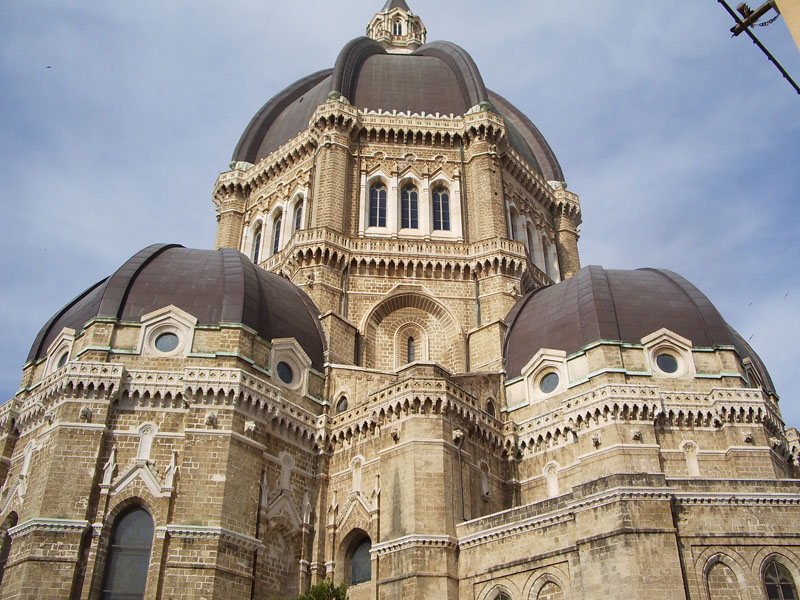 Particolare del Duomo Tonti di Cerignola (FG)